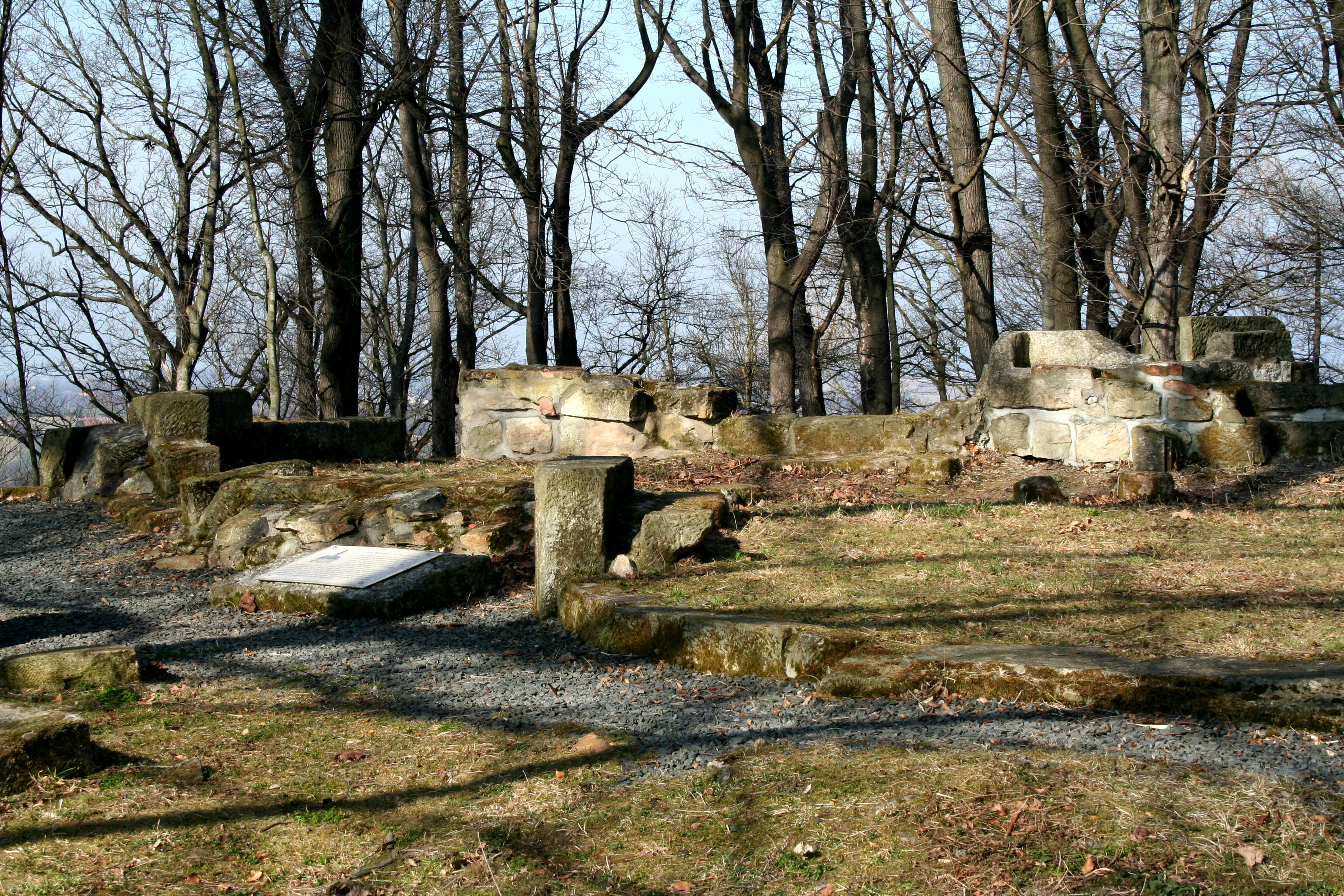 Belvedere Weesenstein, Fundamentreste des 1951 abgerissenen Jagdpavillons.